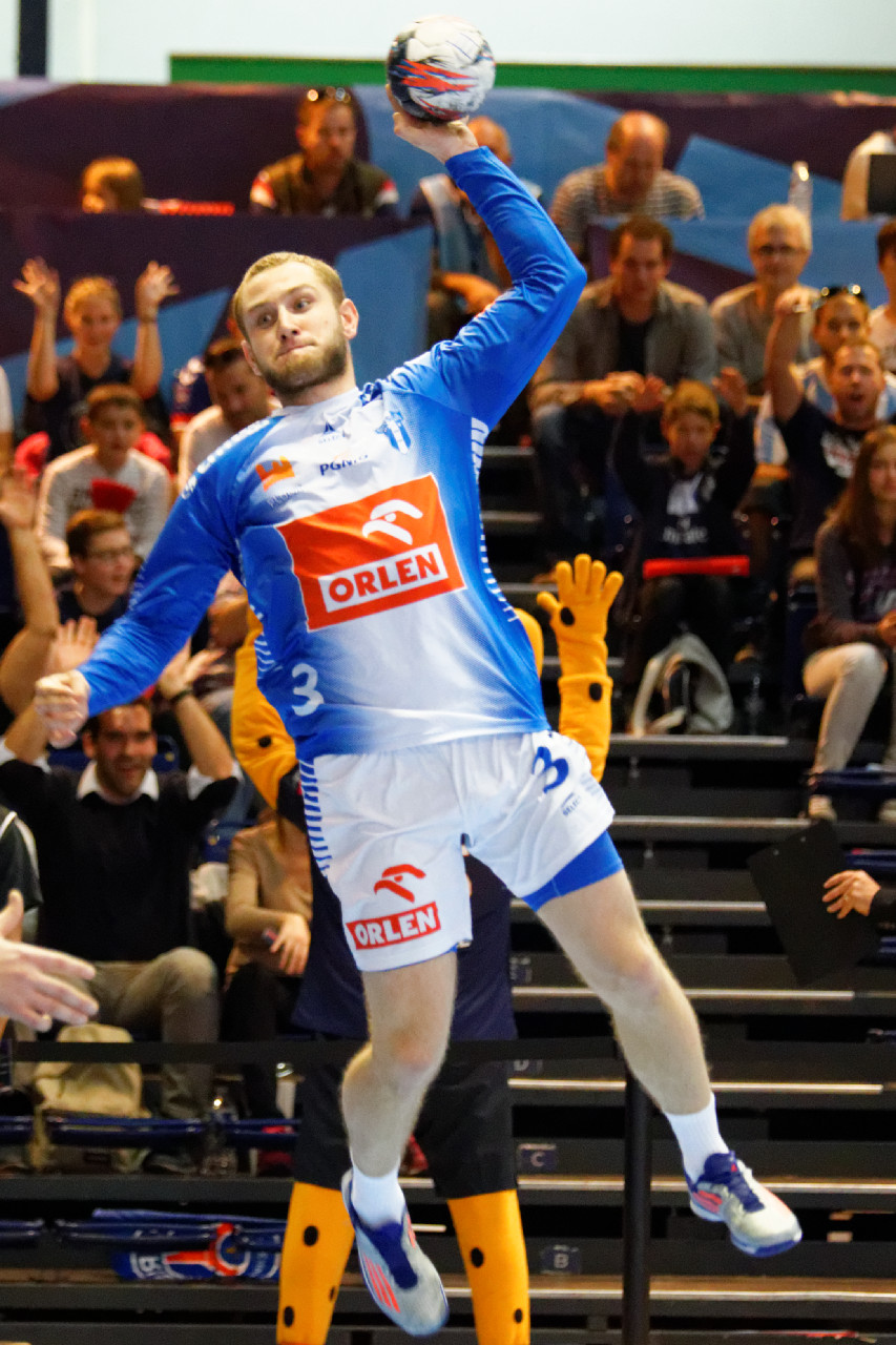 Rencontre de phase de groupe de la ligue des champions 2015-16 entre le PSG et le club polonais de Orlen Wisla Plock. A la Halle Carpentier (Paris), le 27 septembre 2015.